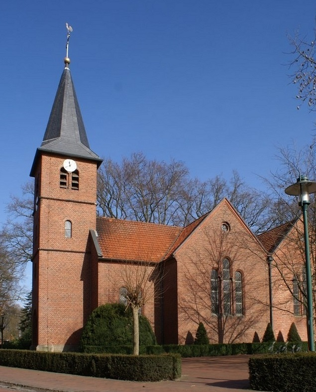 Lüsche, kath. Kirche St. Josef